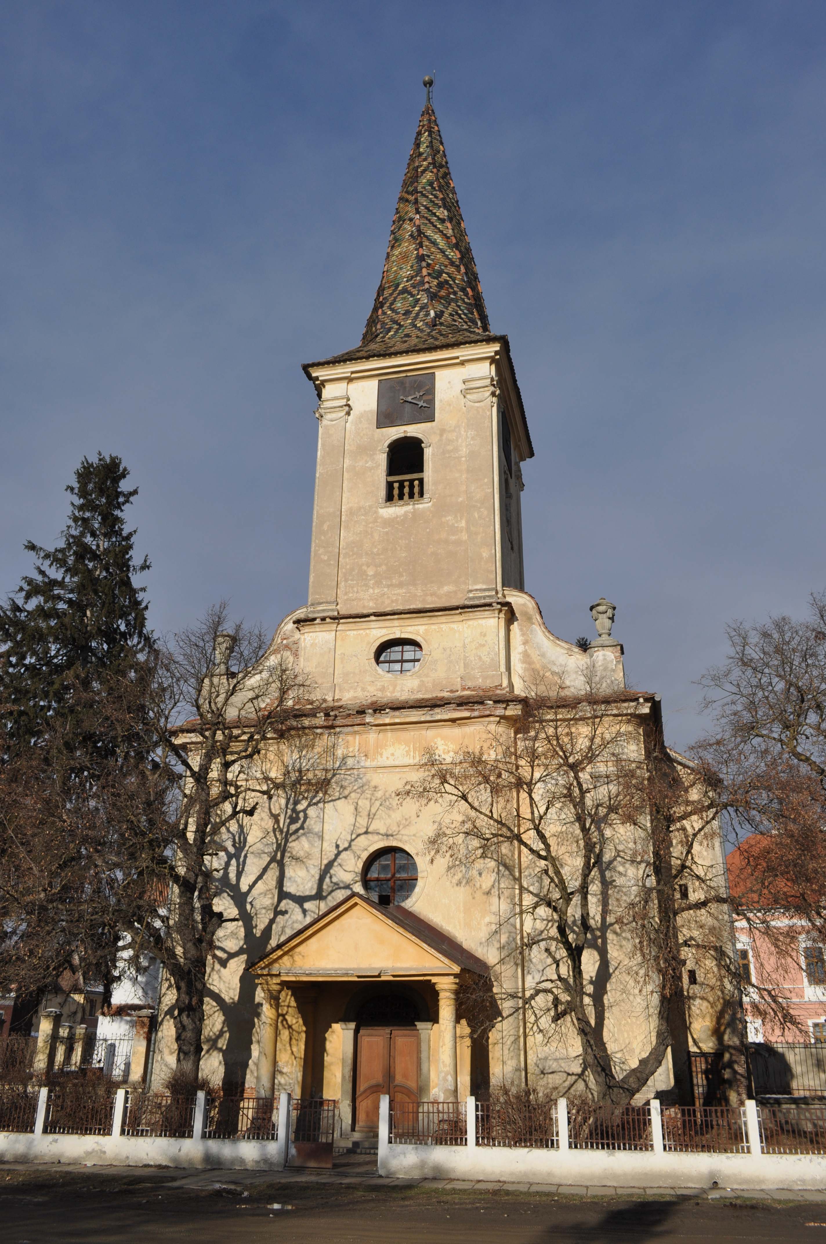 Biserica evanghelică din Nocrich, județul Sibiu